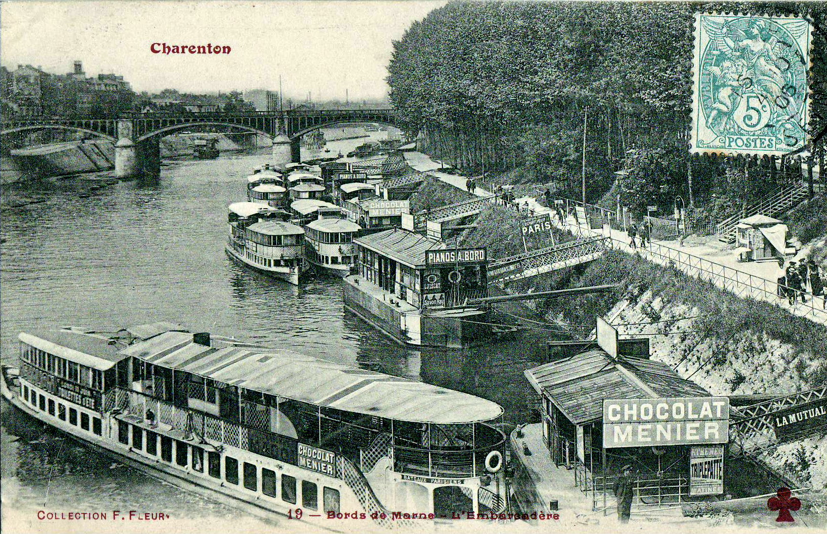 Carte postale ancienne éditée par Fleury, N°19Charenton-le-Pont : Bords de Marne : L'embarcadaire